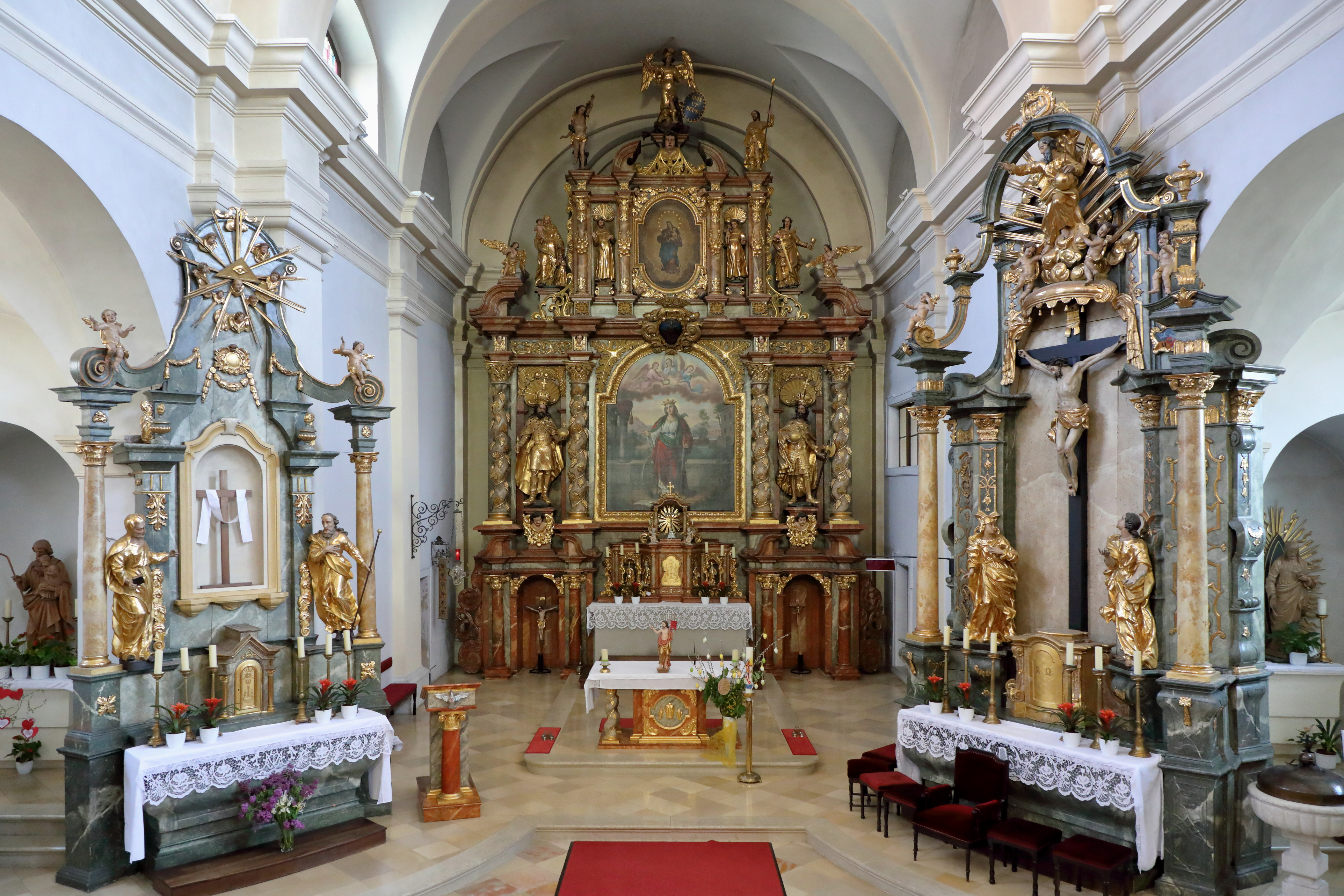 Hochaltar und Seitenaltäre der röm.-kath. Pfarrkirche hl. Katharina in der burgenländischen Marktgemeinde Rechnitz.